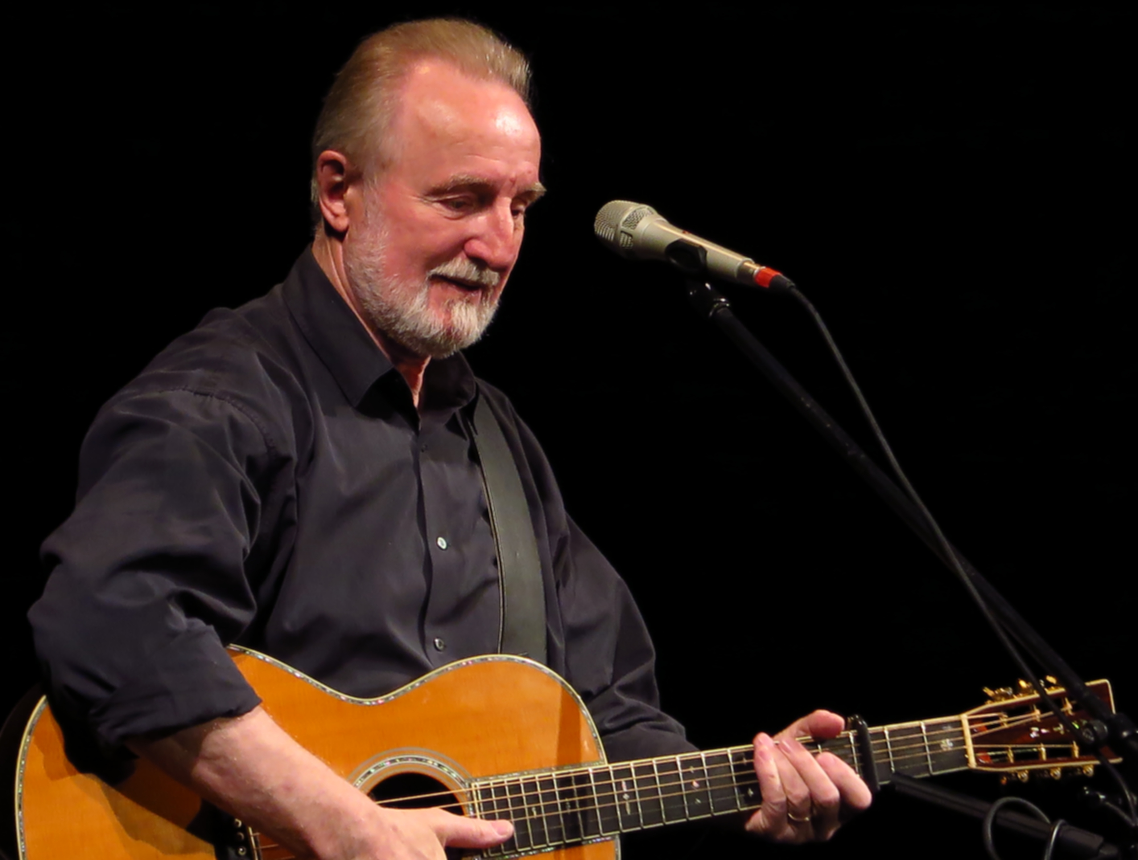 Hannes Wader, deutscher Sänger und Songwriter im April 2015 im Parktheater Göggingen in Augsburg